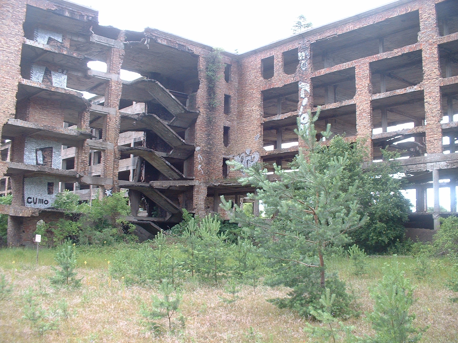 Die Ruinen von Prora auf Rügen. Ehemals Ausbildunggeländer der NAA Fallschirmjäger.